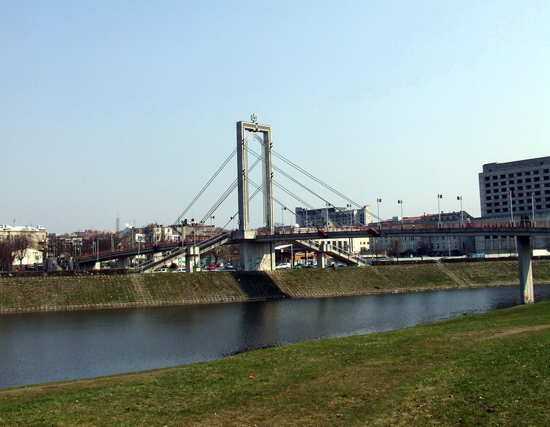 Jurgio Kairio tiltas.